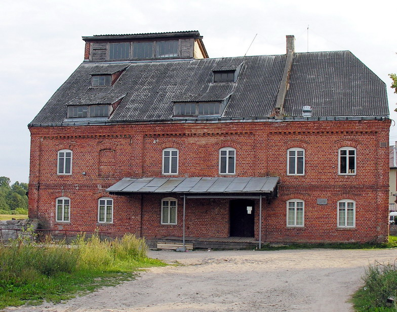 Viekšnių malūnas (past. 1897 m.) - technikos paminklas Foto: Algirdas, 2006 m. rugpkūčio 11 d., Lietuva